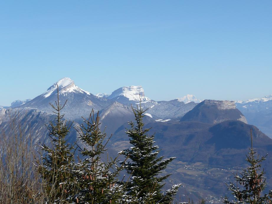 Le massif de la Chartreuse